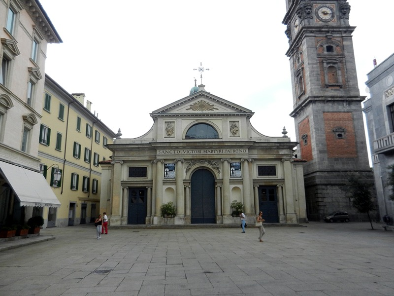 Varese - Basilica di S. Vittore